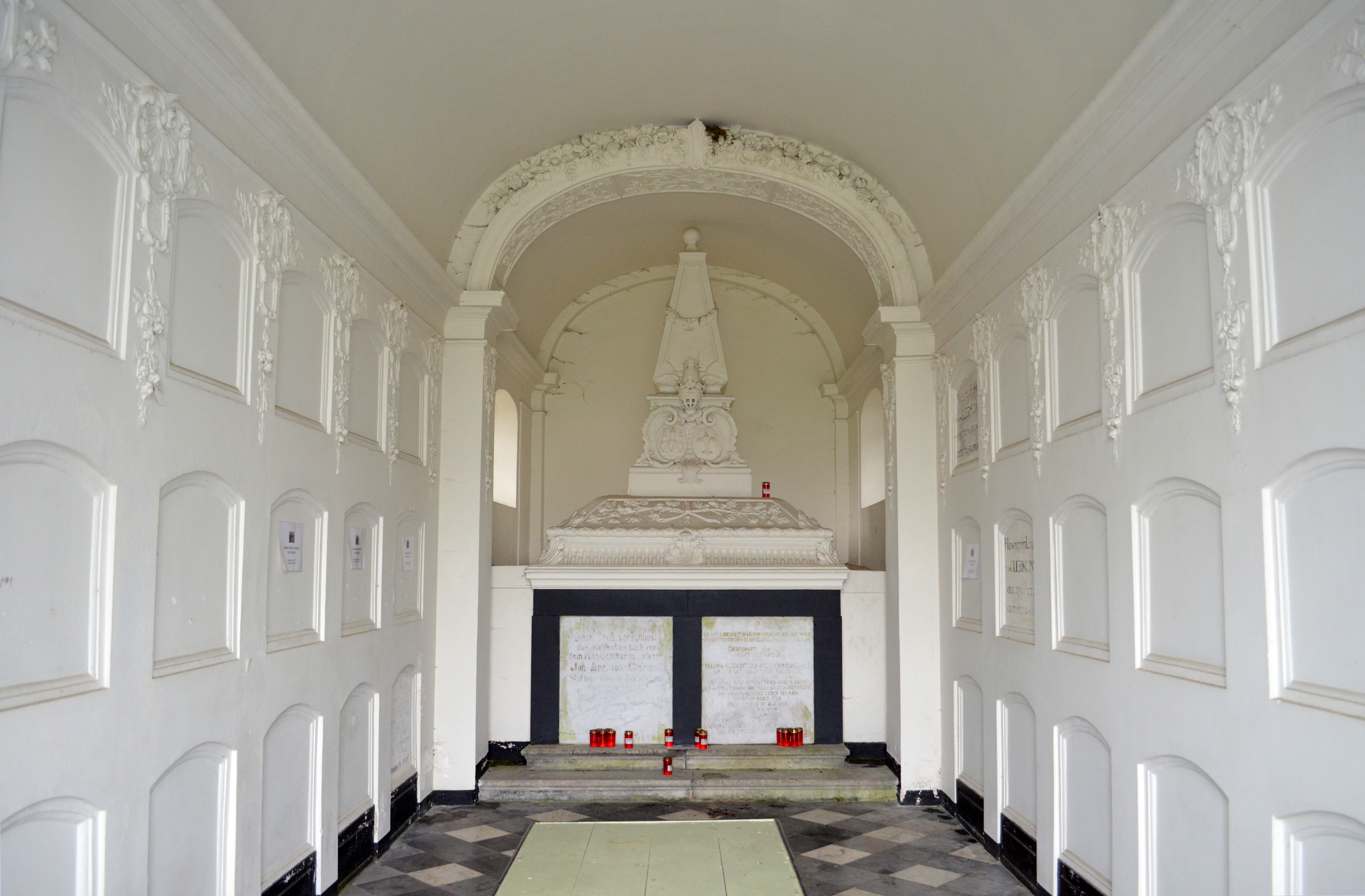 Das Mausoleum der Familie Clermont in Vaals, Innenansicht